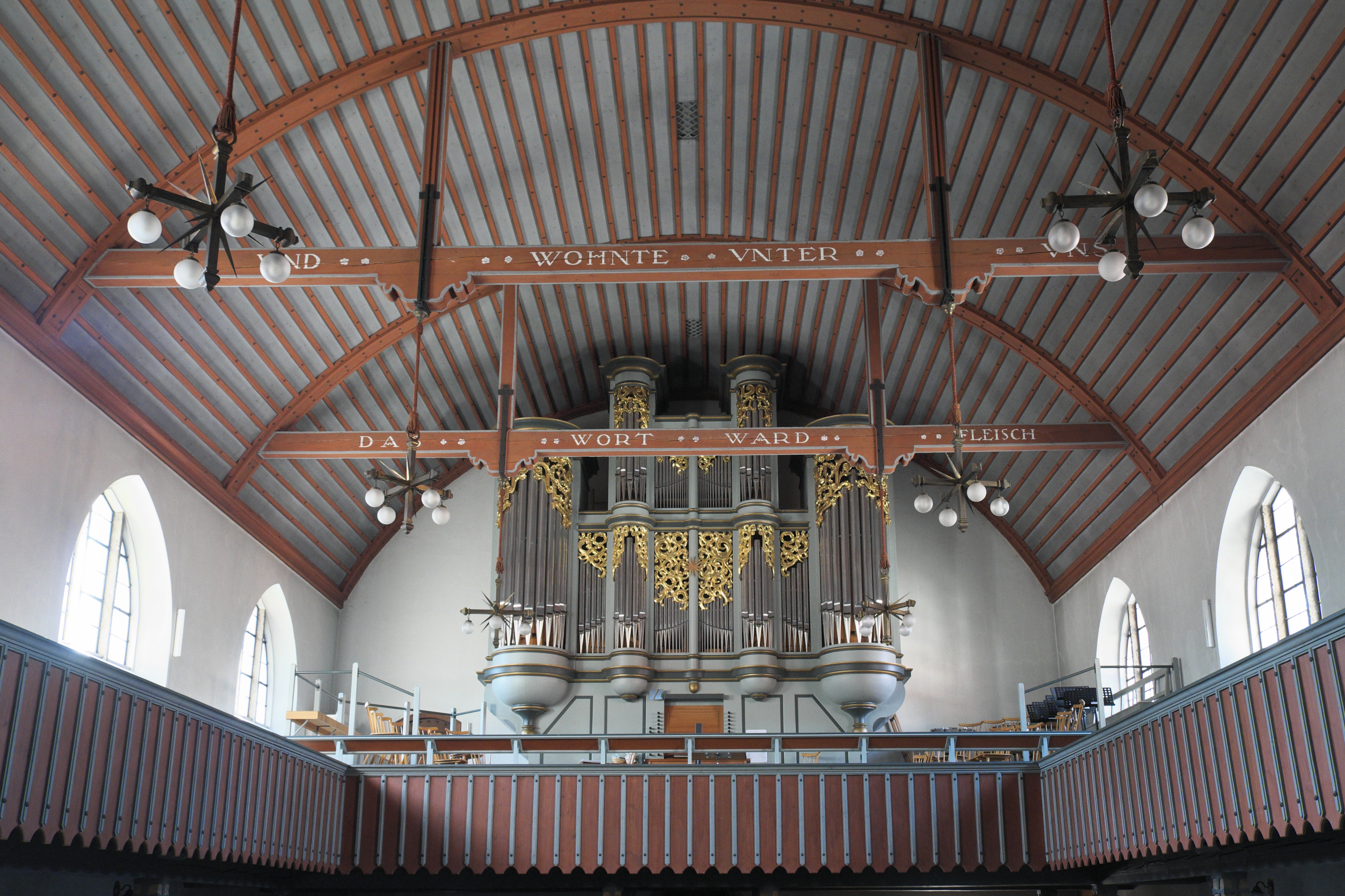 Evangelisch-Lutherische Erlöserkirche in Fürstenfeldbruck (Bayern/Deutschland), Empore